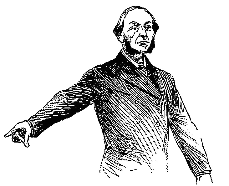 "M. de Ménorval".